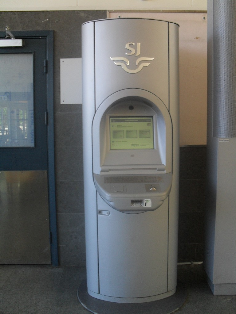 En automat hos SJ